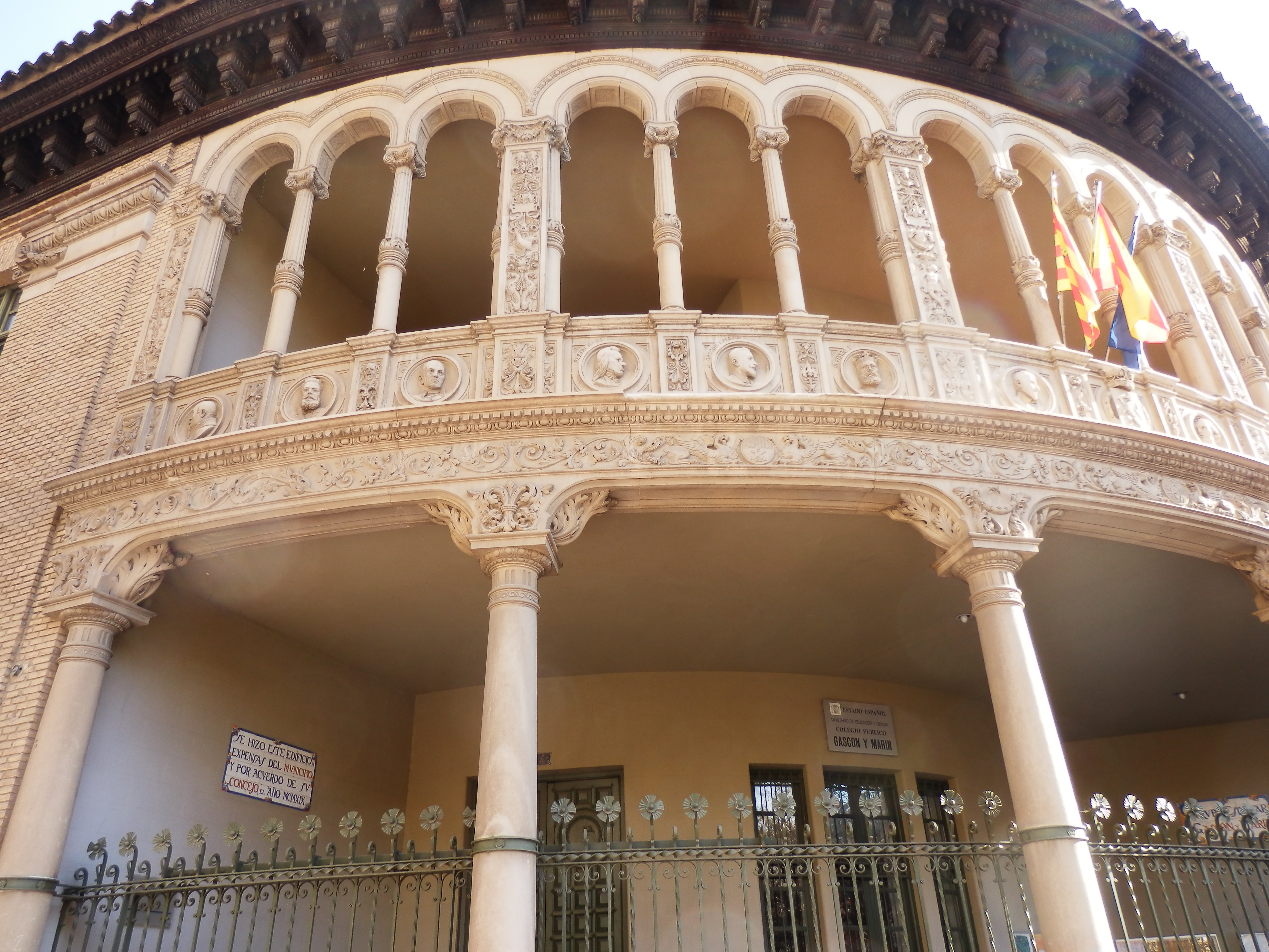 Escuela Gascón y Marín en Zaragoza